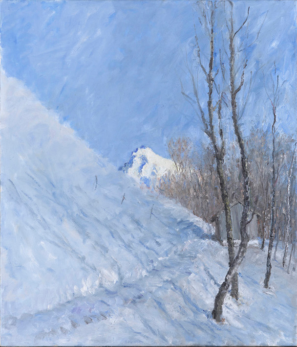 Diedamskopf mit verschneitem Weg und Bäumen, Öl auf Leinwand, 75,5x64,5cm, 90er Künstler: Hubert Dietrich